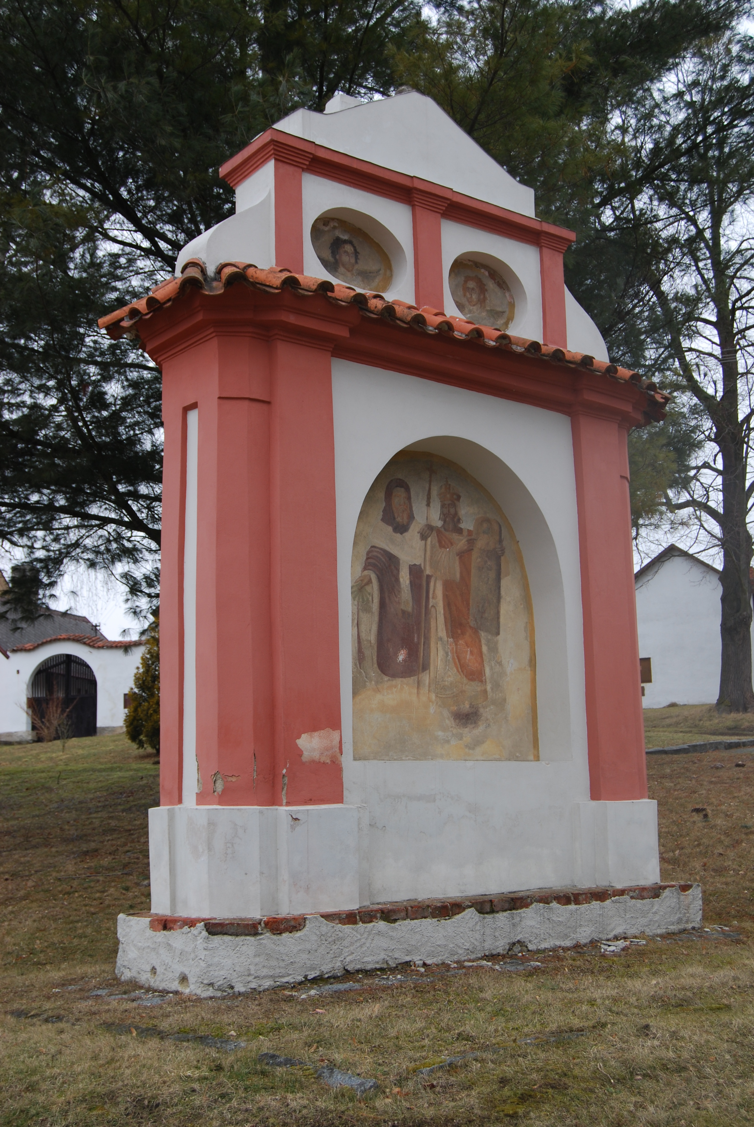 Výklenková kaple sv. Cyrila a Metoděje v obci. Horosedly. Okres Písek. Česká republika.